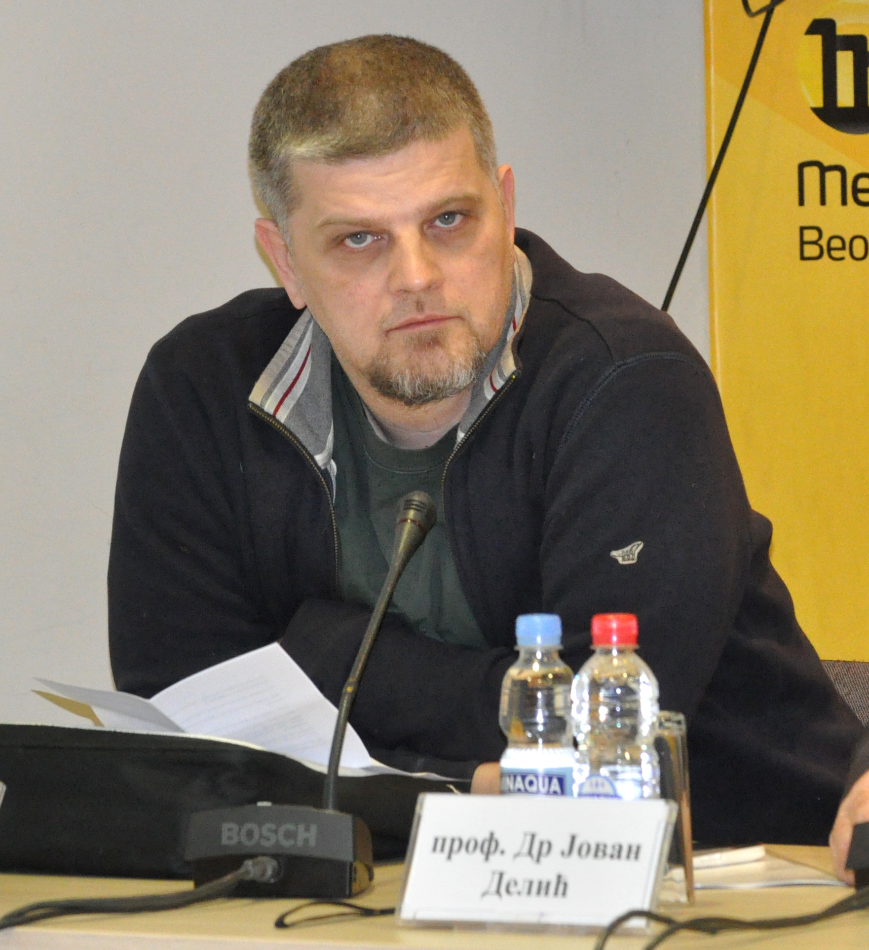 Владимир Кецмановић српски писац